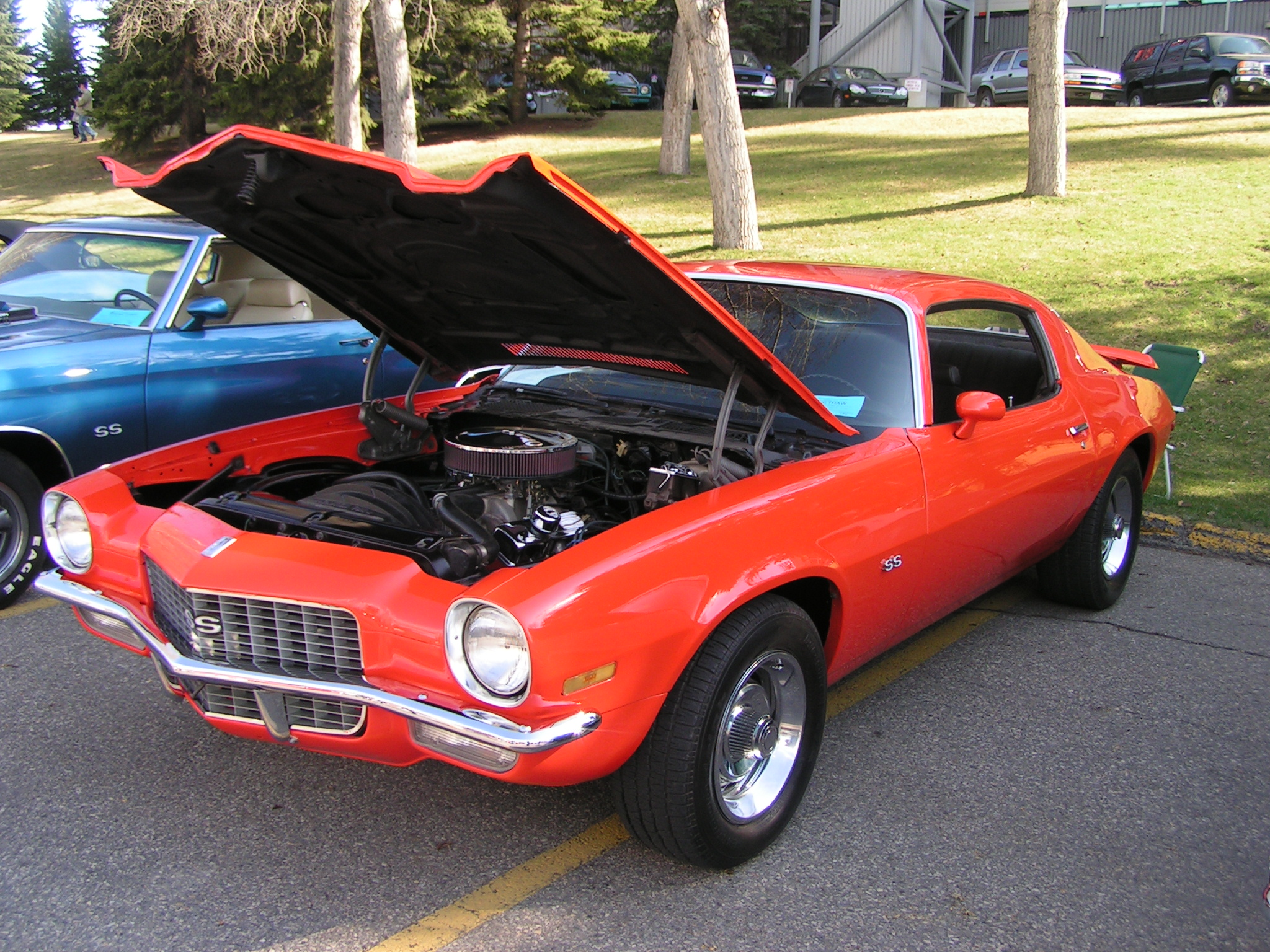 Chevrolet Camaro SS